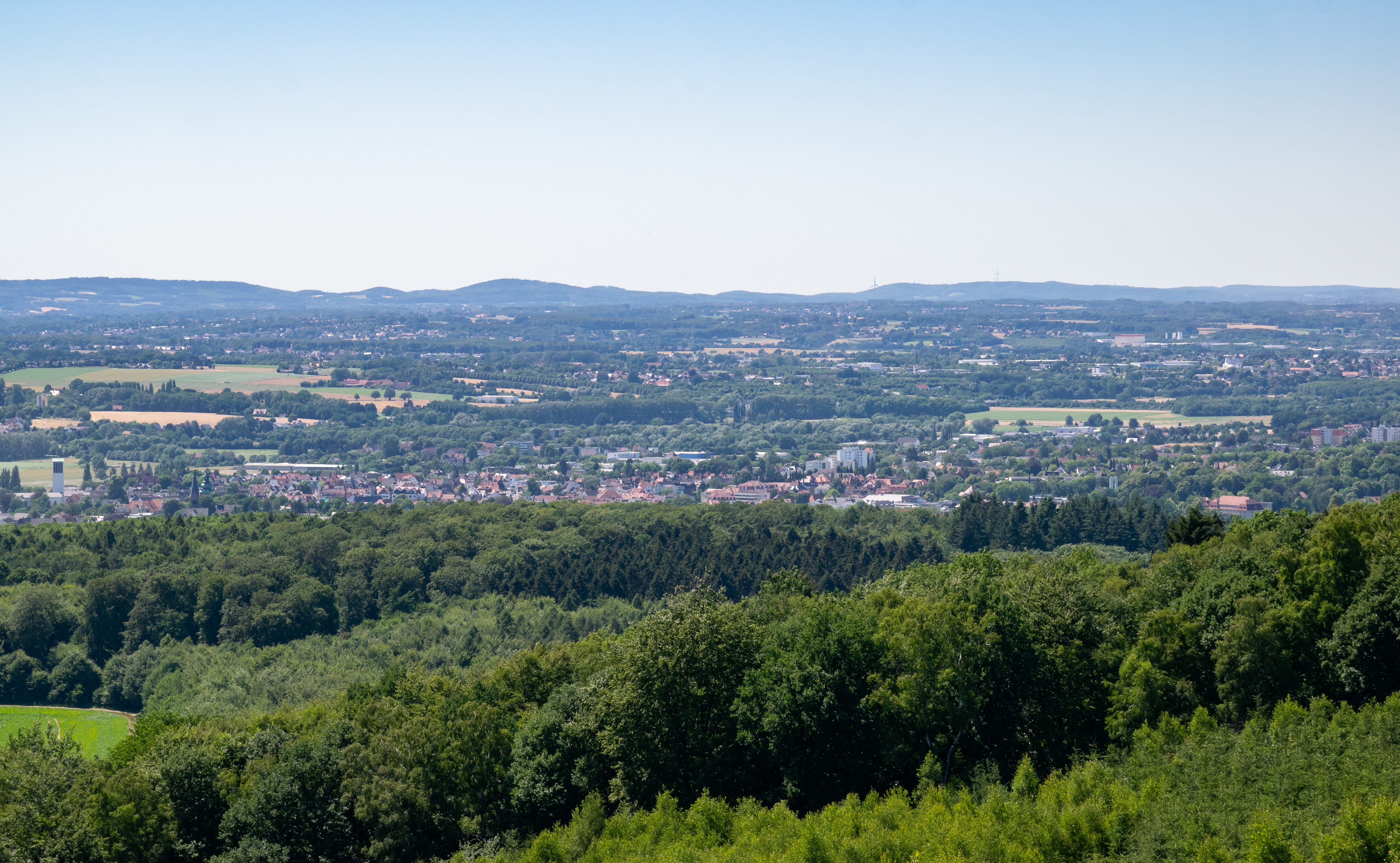 Aussicht vom Bismarckturm in Bad Salzuflen (Richtung Bad Salzuflen)